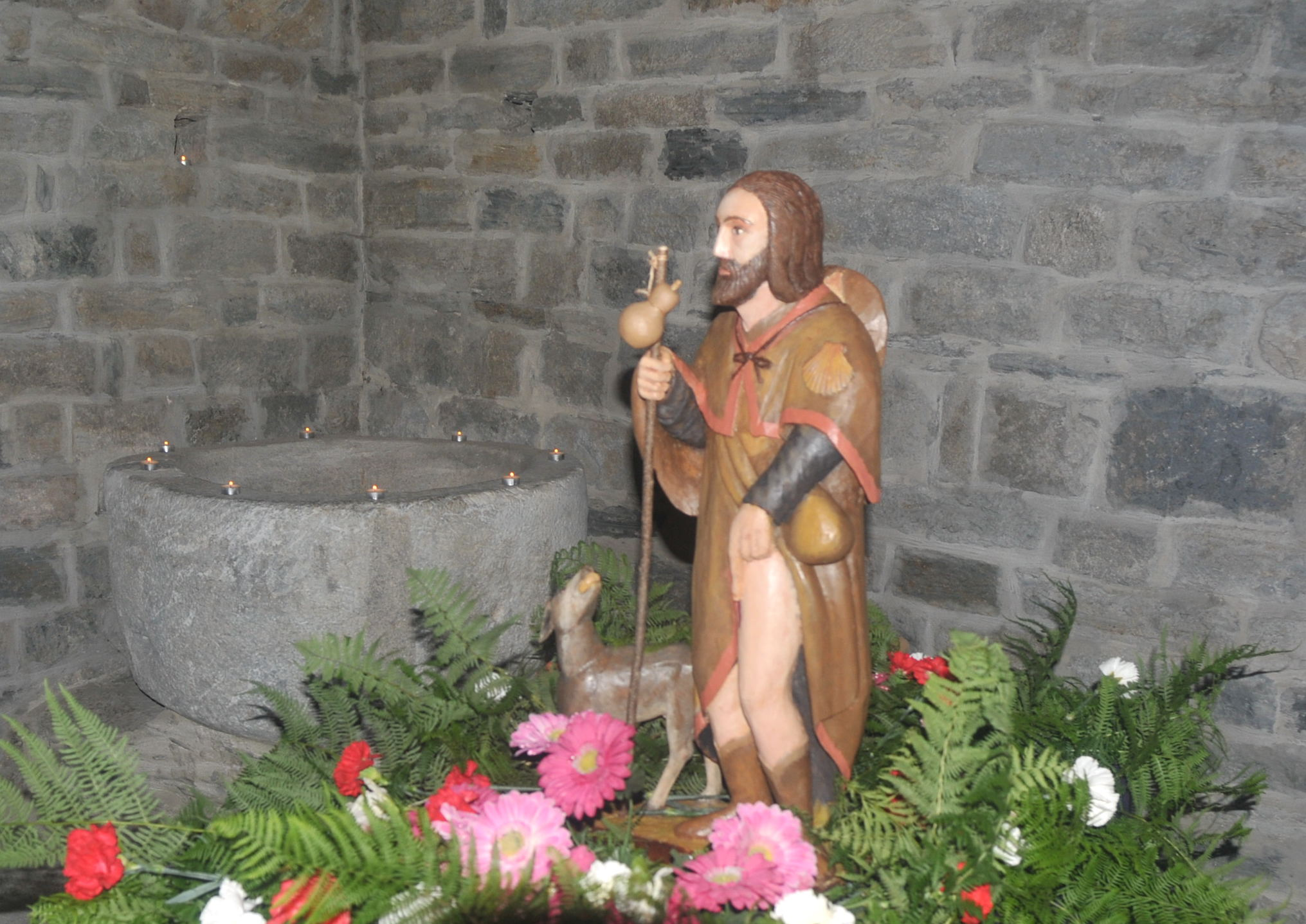 Obra de l’artista Antonio Fernández de Ortega e García de Acilu entronitzada el 15 d'agost de 2018 a l'església de Santa Maria de Vilamòs.